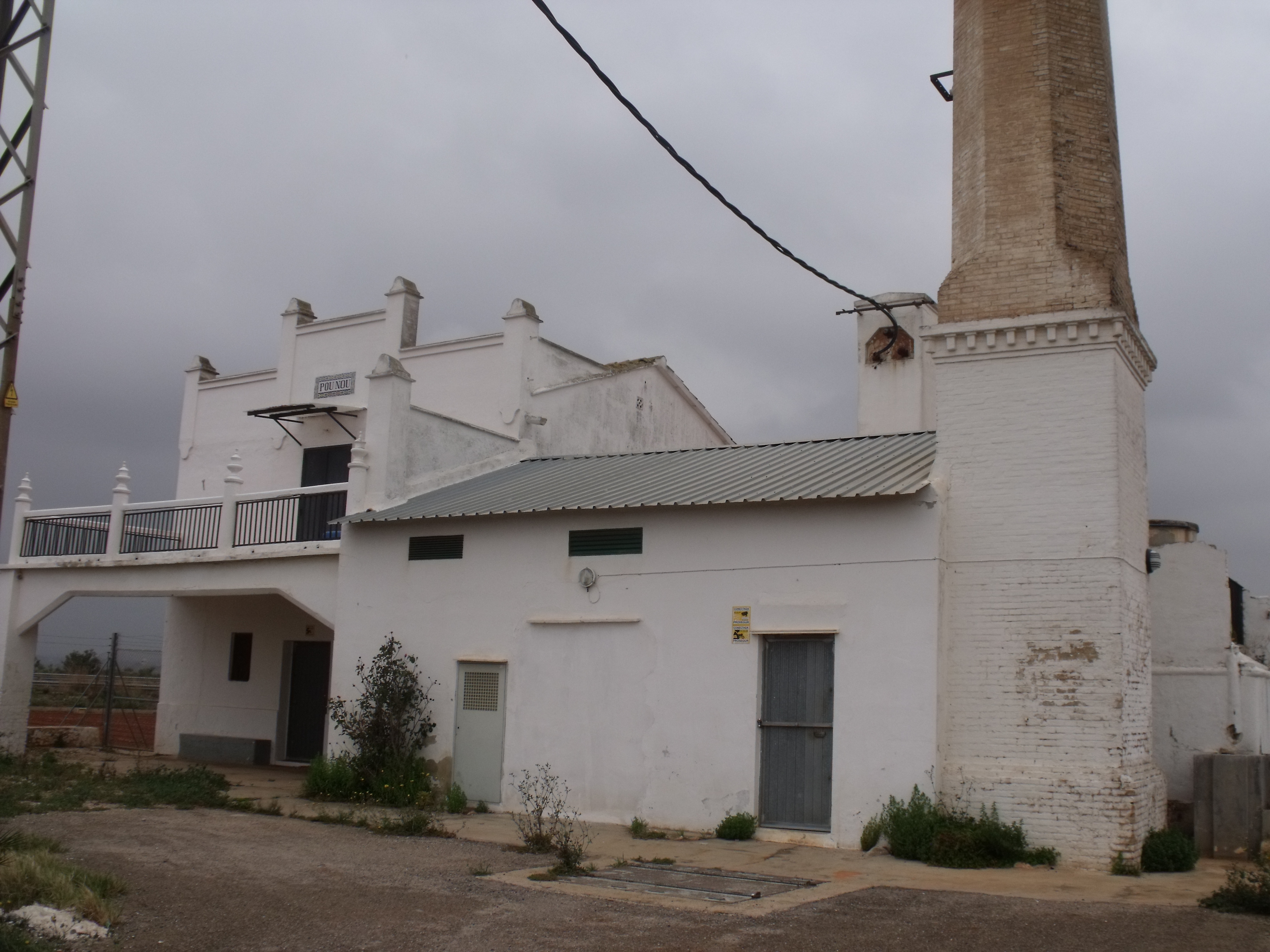 Pou Nou. Catarroja.